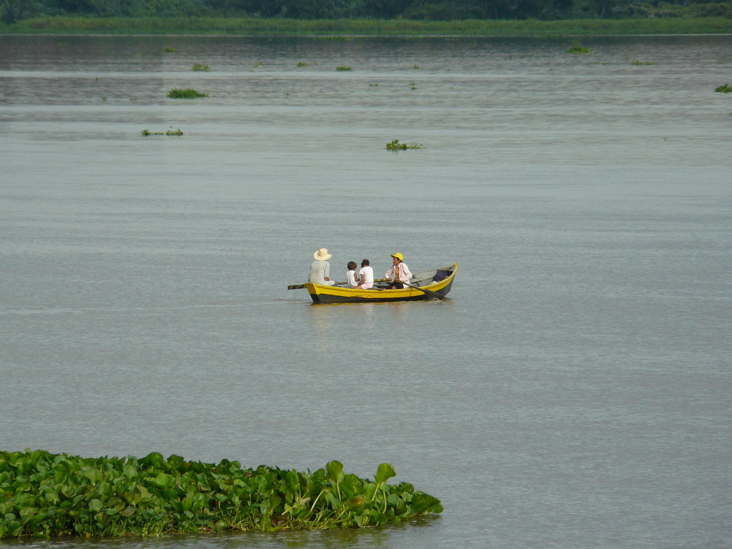 Piquete Cue